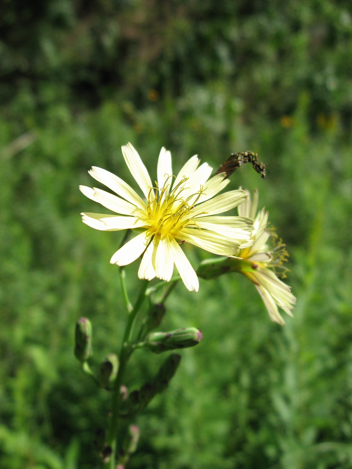 アキノノゲシ Lactuca indica var. laciniata (Kuntze.)